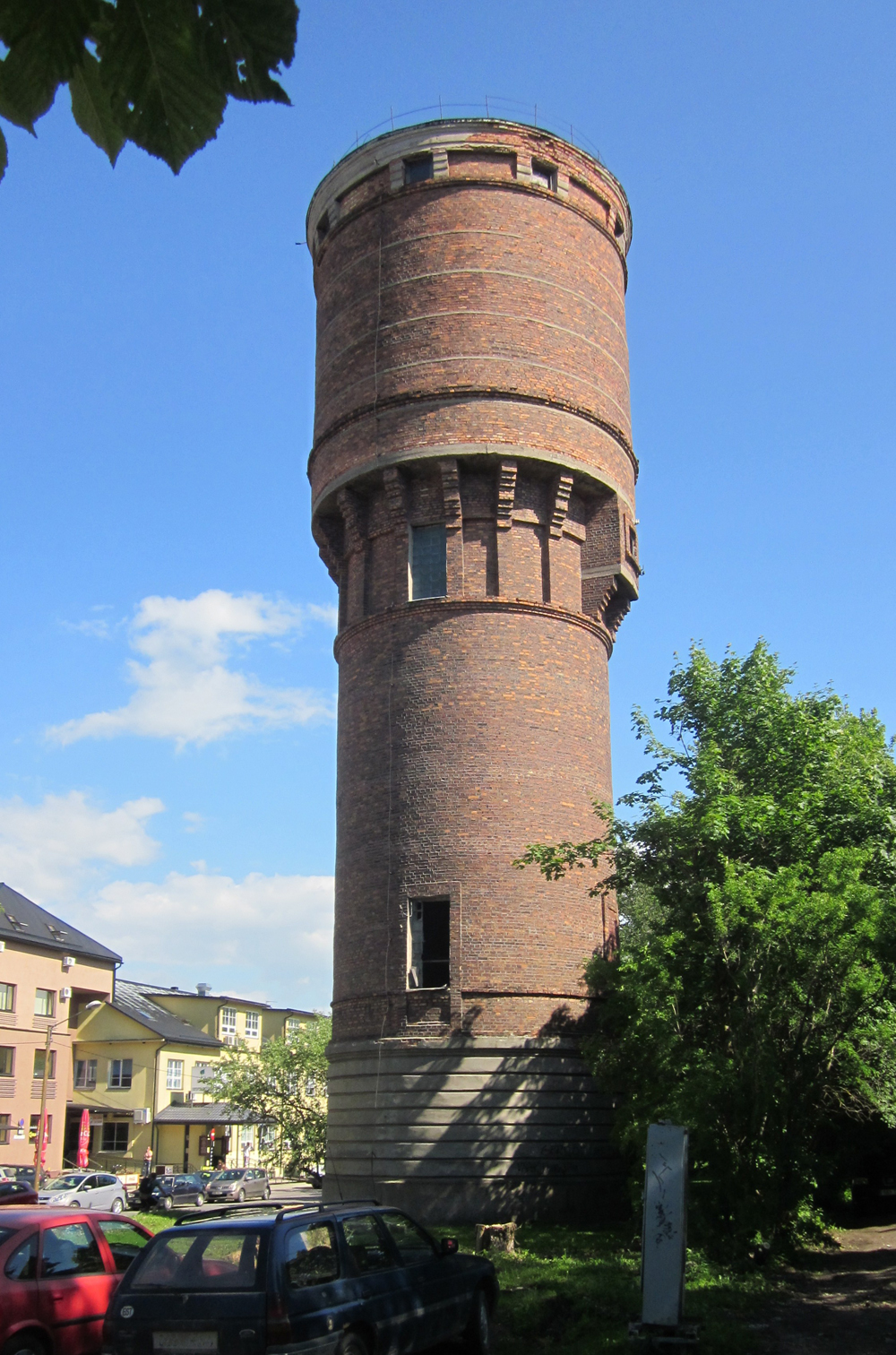 Tartu rdt veetorn (vasemalt paistab töötukassa hoone nurk)